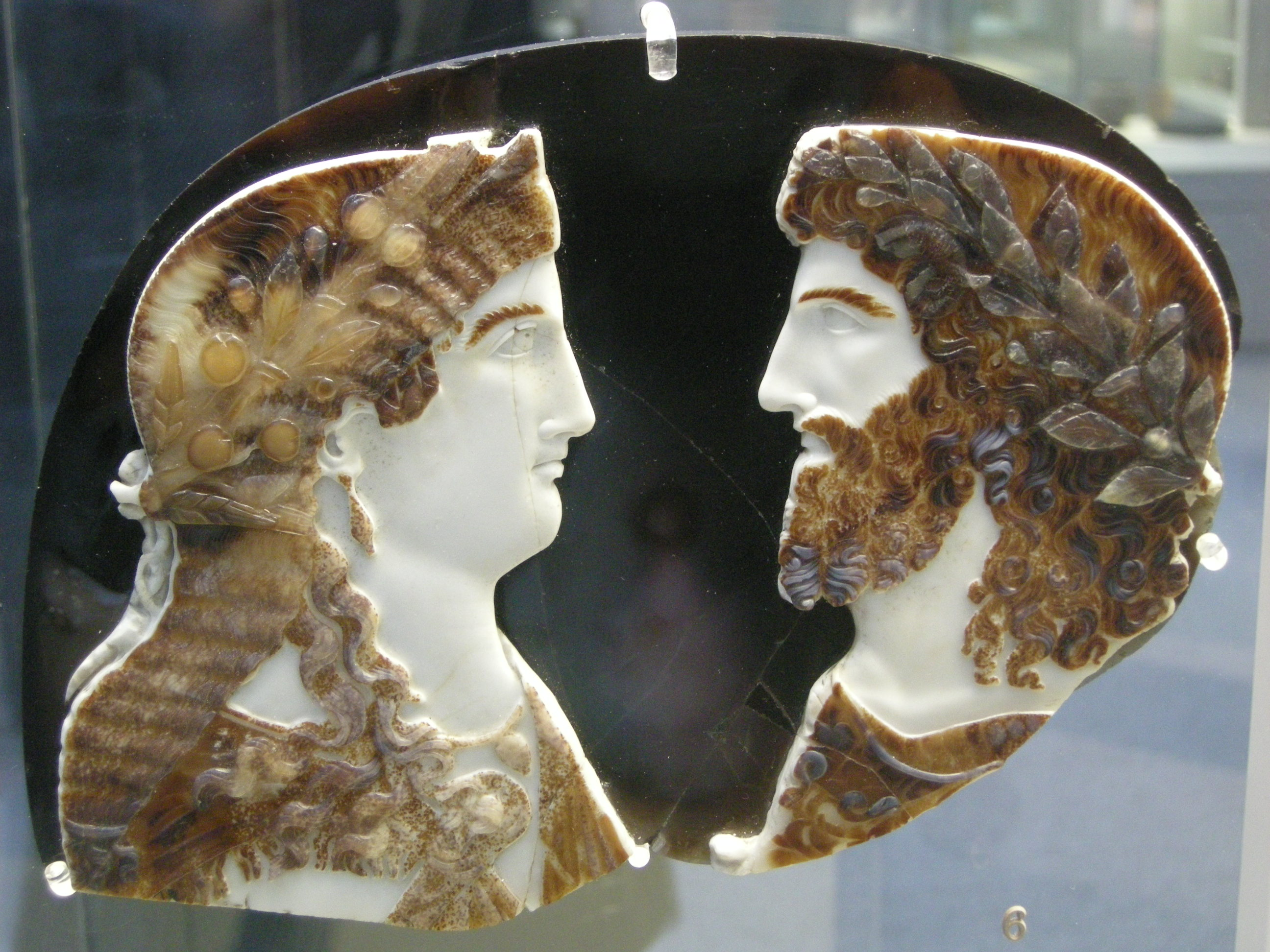 Arte romana, cameo in sardonice con due mebri della famiglia imperiale come giove ammone e giunone (o iside), 37-50 dc